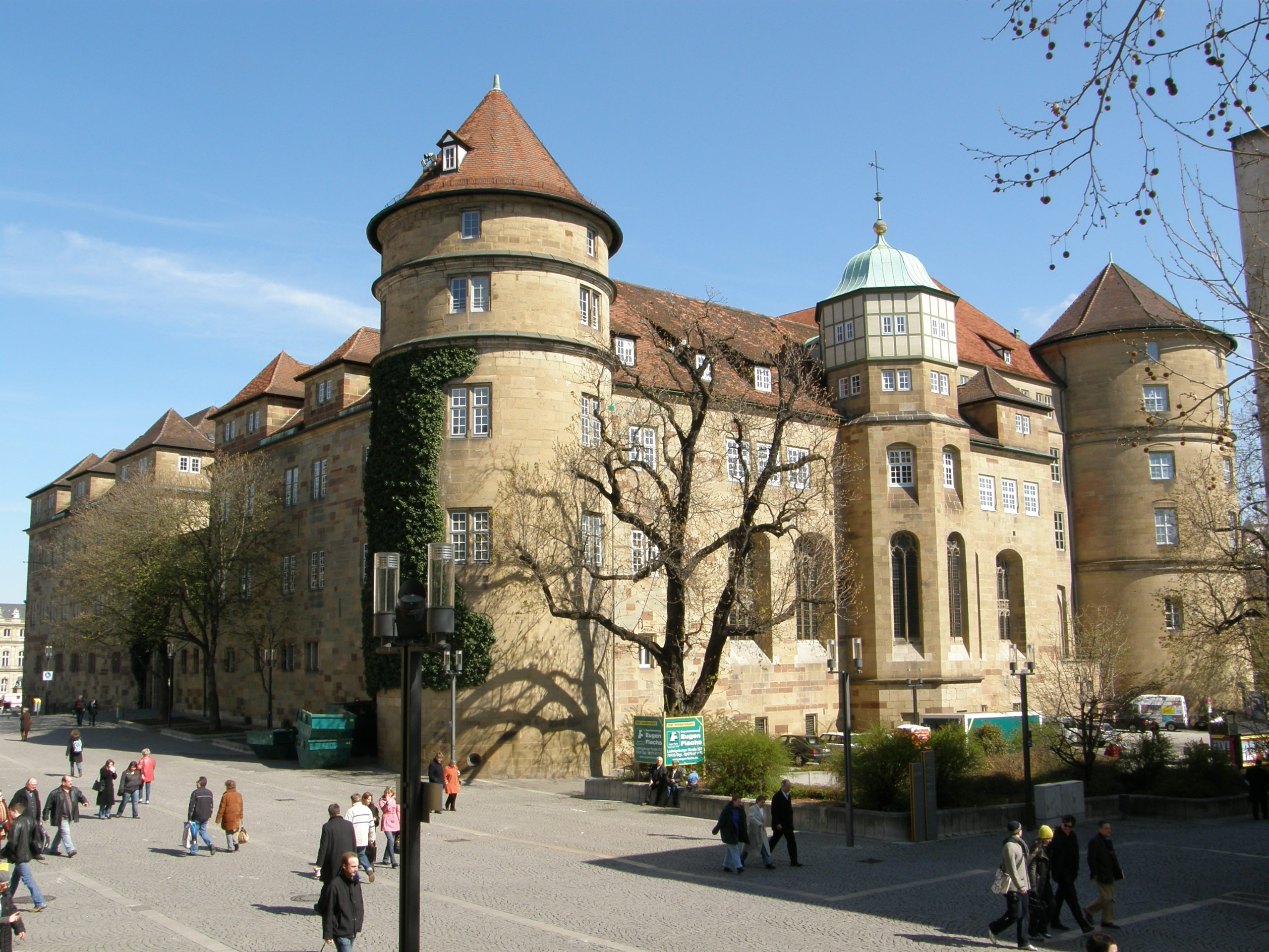 Stuttgart. Altes Schloss, Blick von der Stiftskirche.